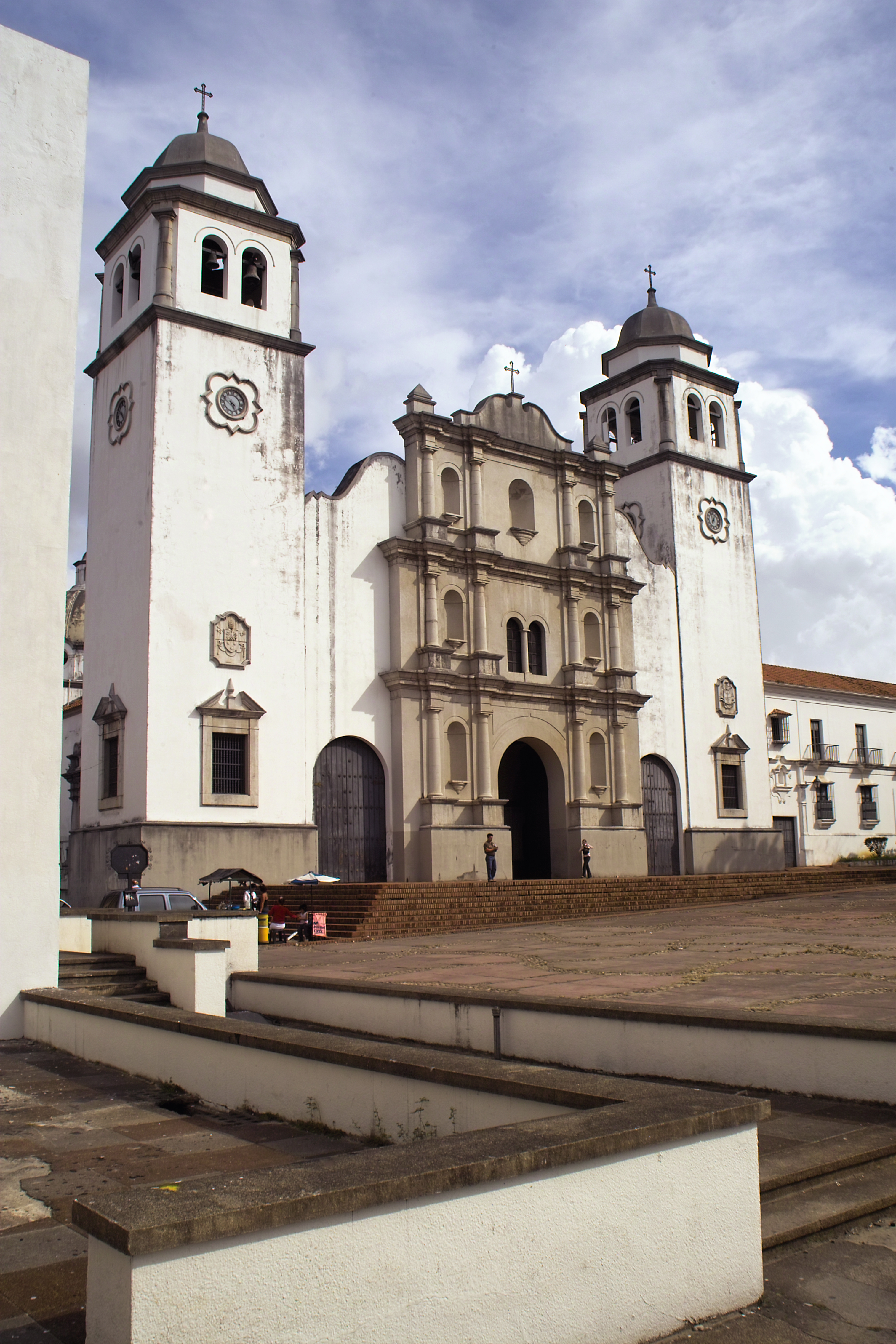 punto de referencia religiosa, histórica y social de la ciudad de San Cristóbal, ubicada en el centro de la ciudad frente a la plaza Juan Maldonado. Vista tomada desde el palacio de justicia sede de los tribunales de la ciudad.